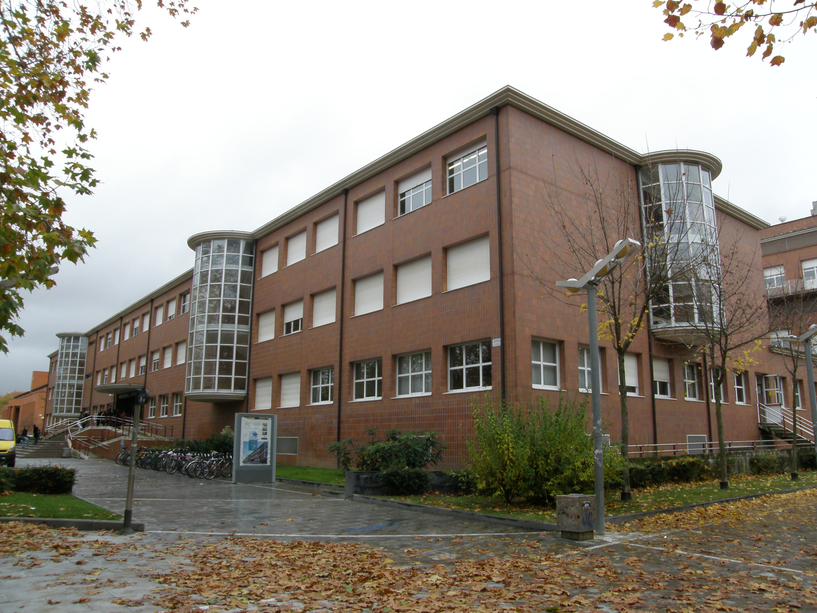 Fachada norte de la Facultad de de Farmacia de Vitoria-Gasteiz (Espapña).